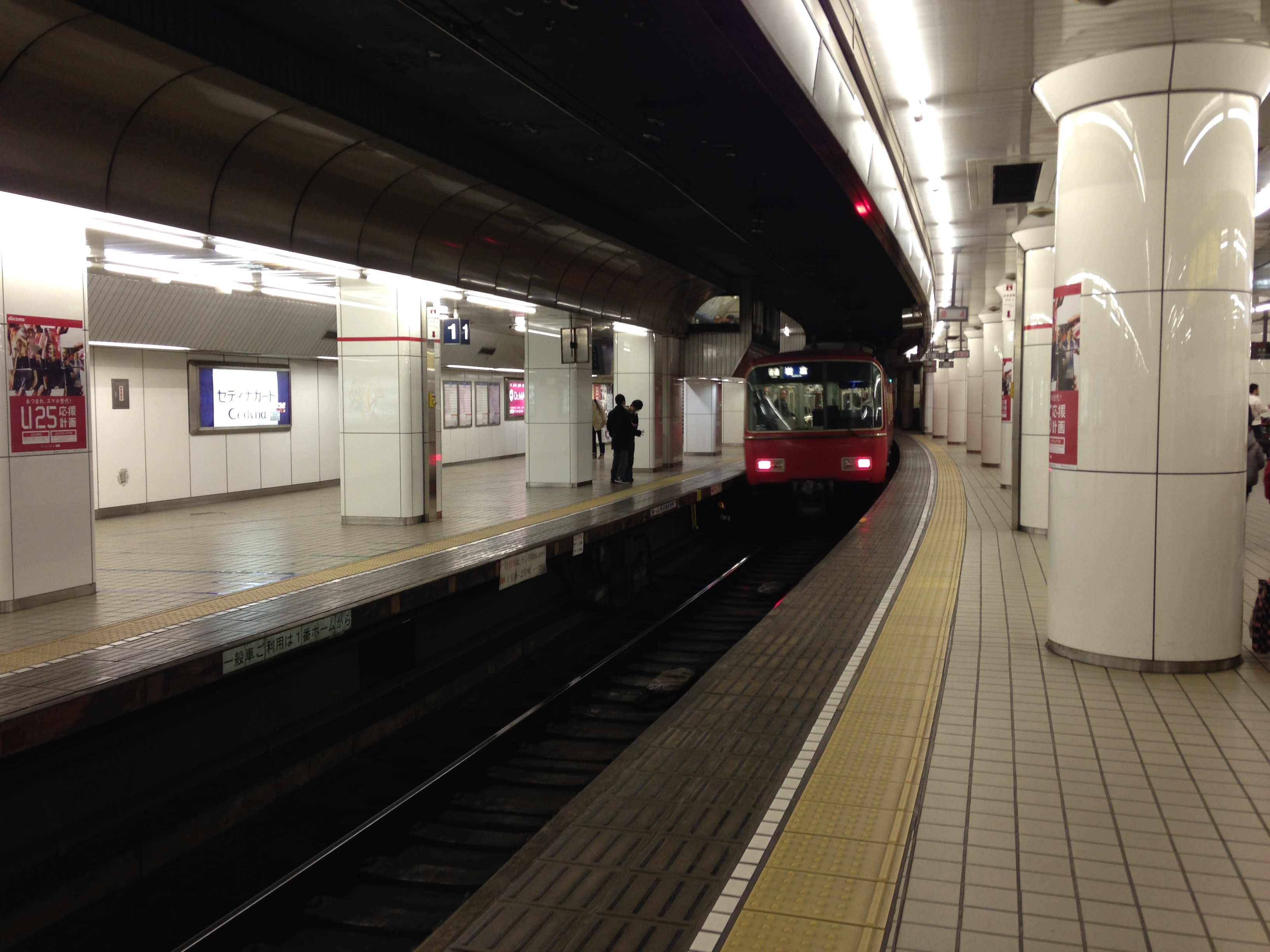 名鉄名古屋駅のホームを発車した岩倉行き普通列車